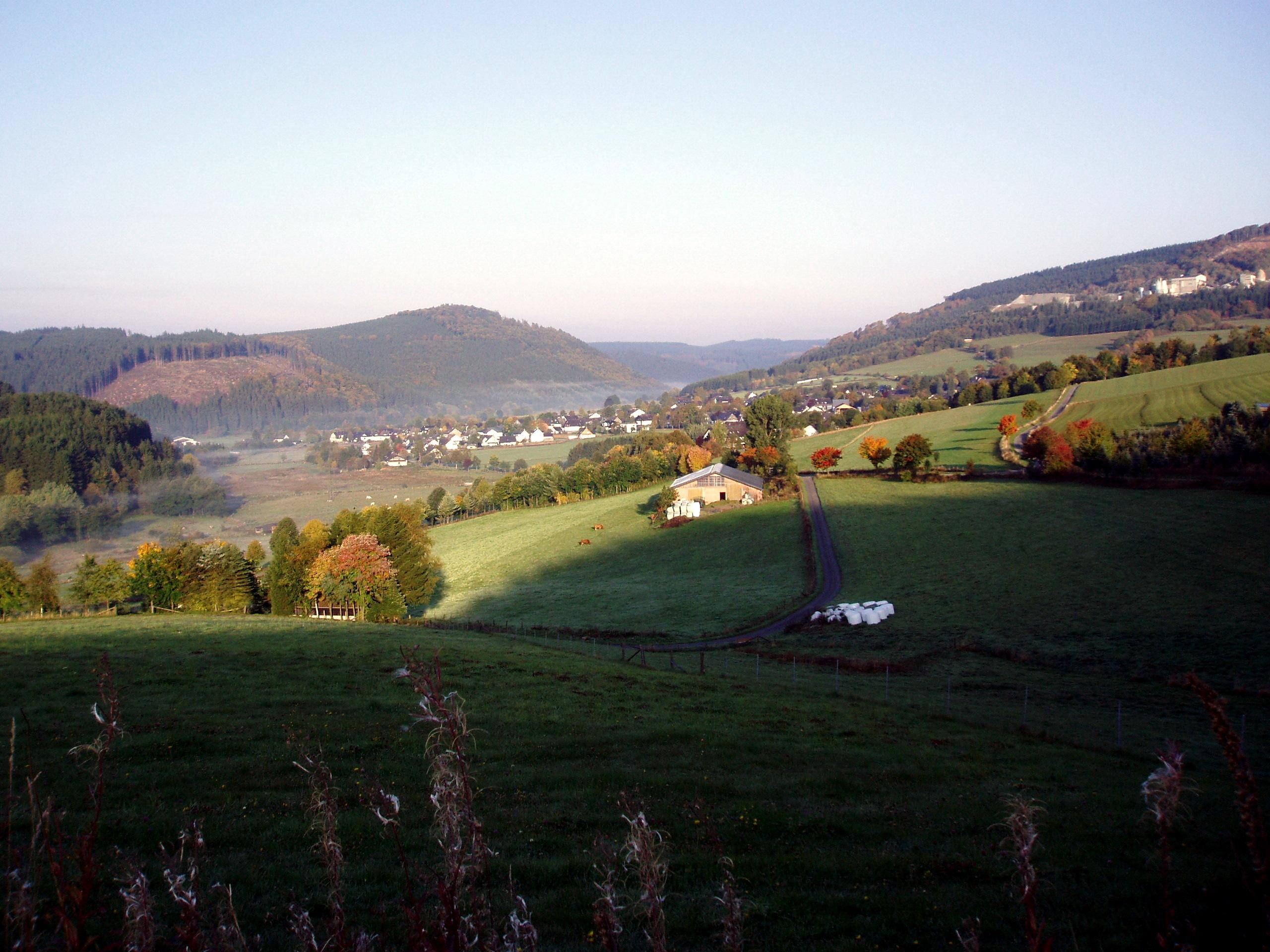 Hildfeld im Herbst mit Landschaftsschutzgebiet Kulturlandschaftskomplex Grönebach / Hildfeld und Wald vom LSG Winterberg im Hintergrund